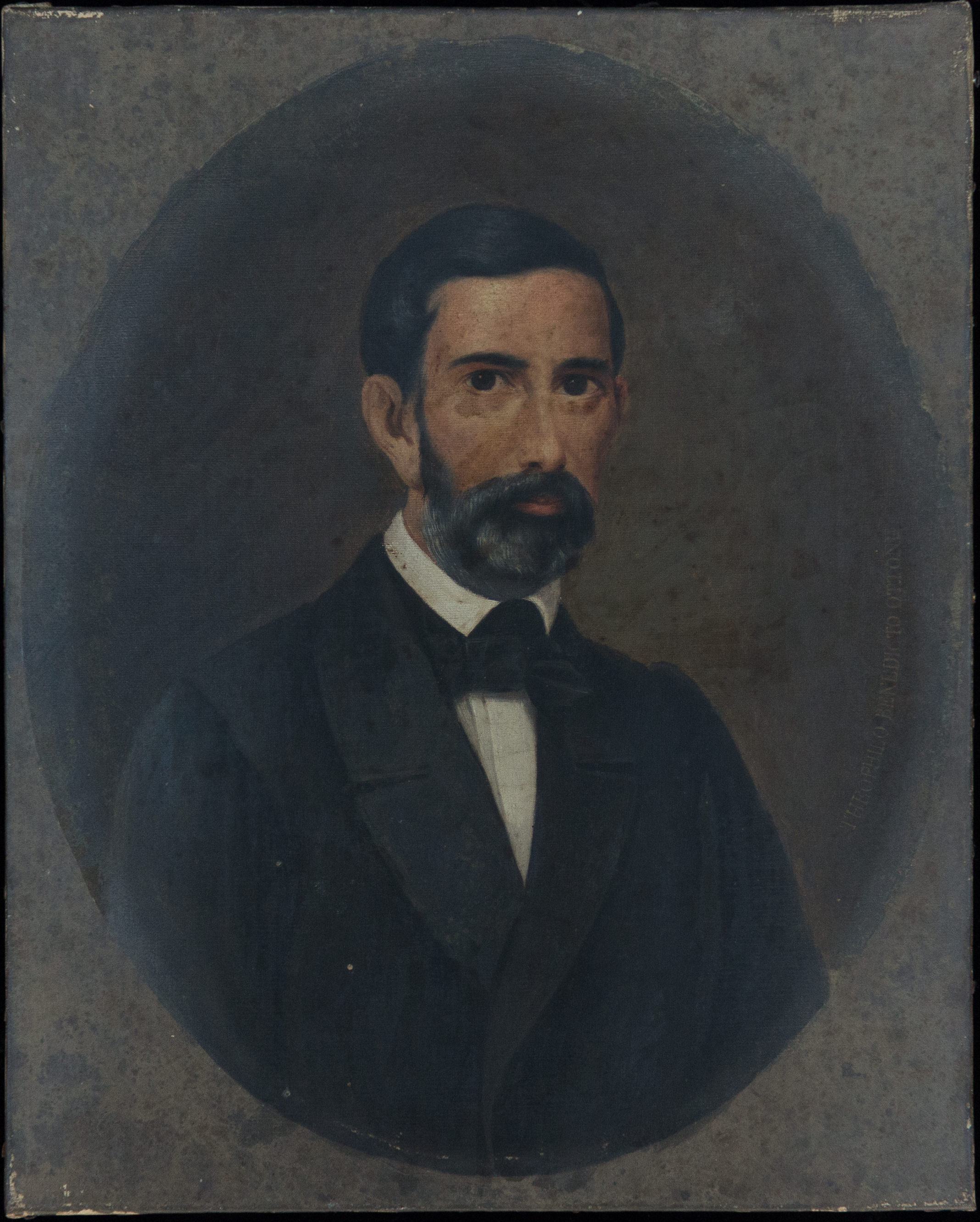 Obra da coleção Brasiliana Iconográfica.